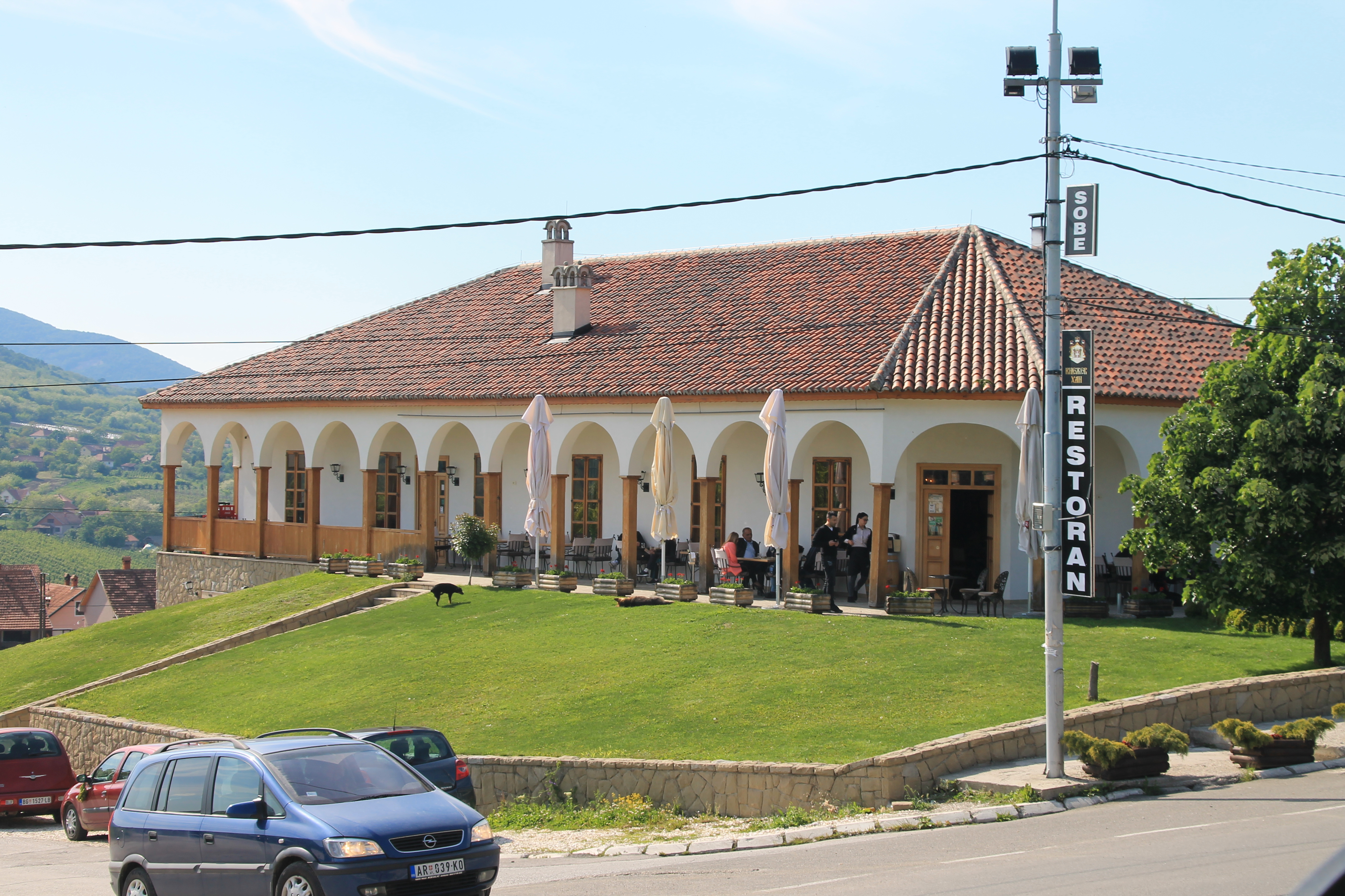 Buildings in Topola